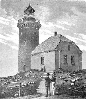 Fyrtaarnet paa Sprogø er opført i Aarene 1867-68 paa det Sted, hvor vistnok Valdemar den Store byggede et fast Taarn til Forsvar mod Venderne. Dets Lanterne er 107 Fod over Havoverfladen.